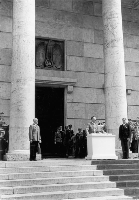 München, 18. Juli 1937 Eröffnung des Hauses der Deutschen Kunst und der großen Deutschen Kunstausstellung